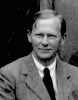 中文（香港）: Portrait of Herbert Westren Turnbull (1885-1961) in 1926